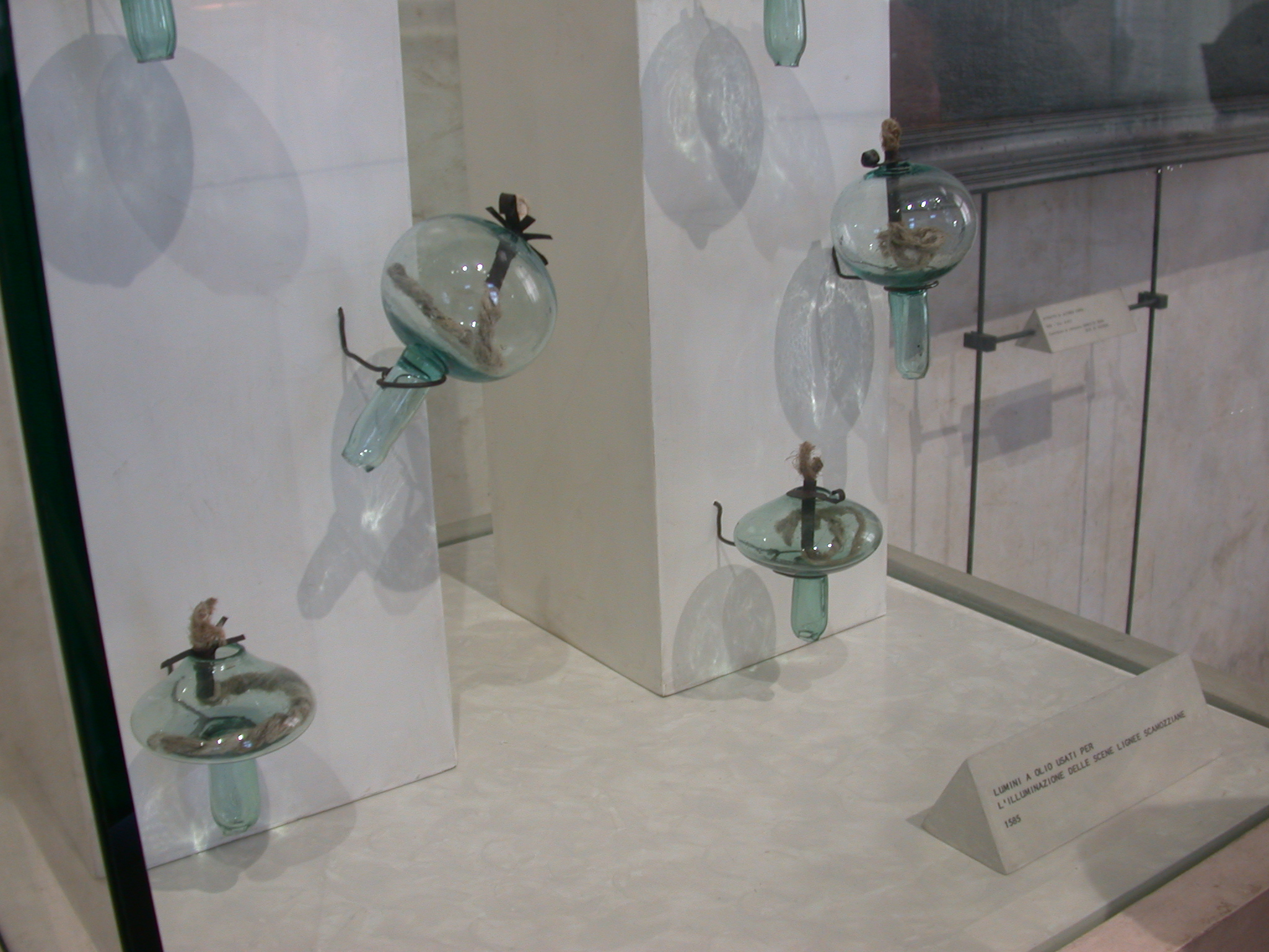 Vicenza - Teatro Olimpico - Lumini a olio dell'antica illuminazione delle scene lignee Scamozziane (1585)